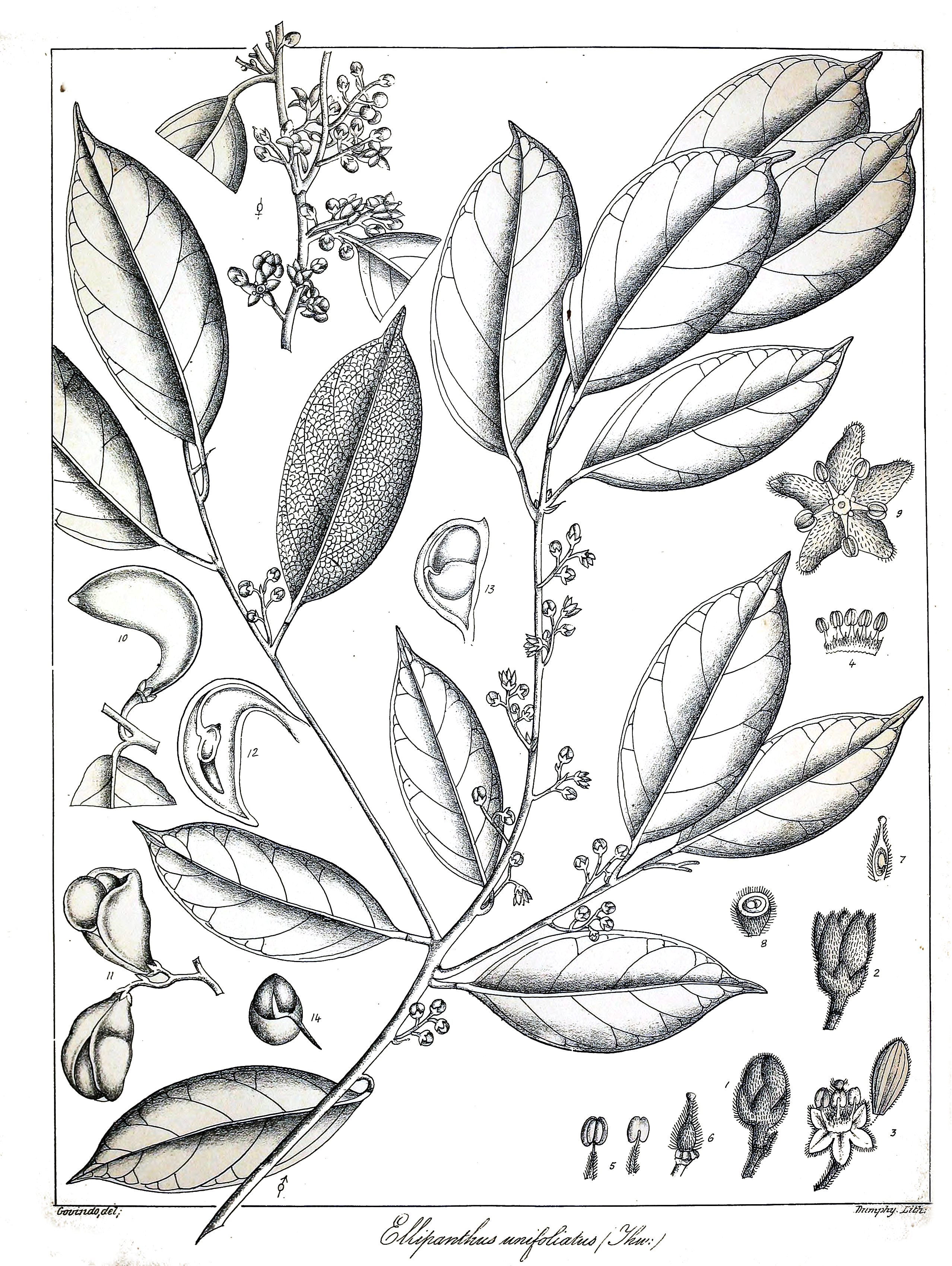 Ellipanthus unifoliatus